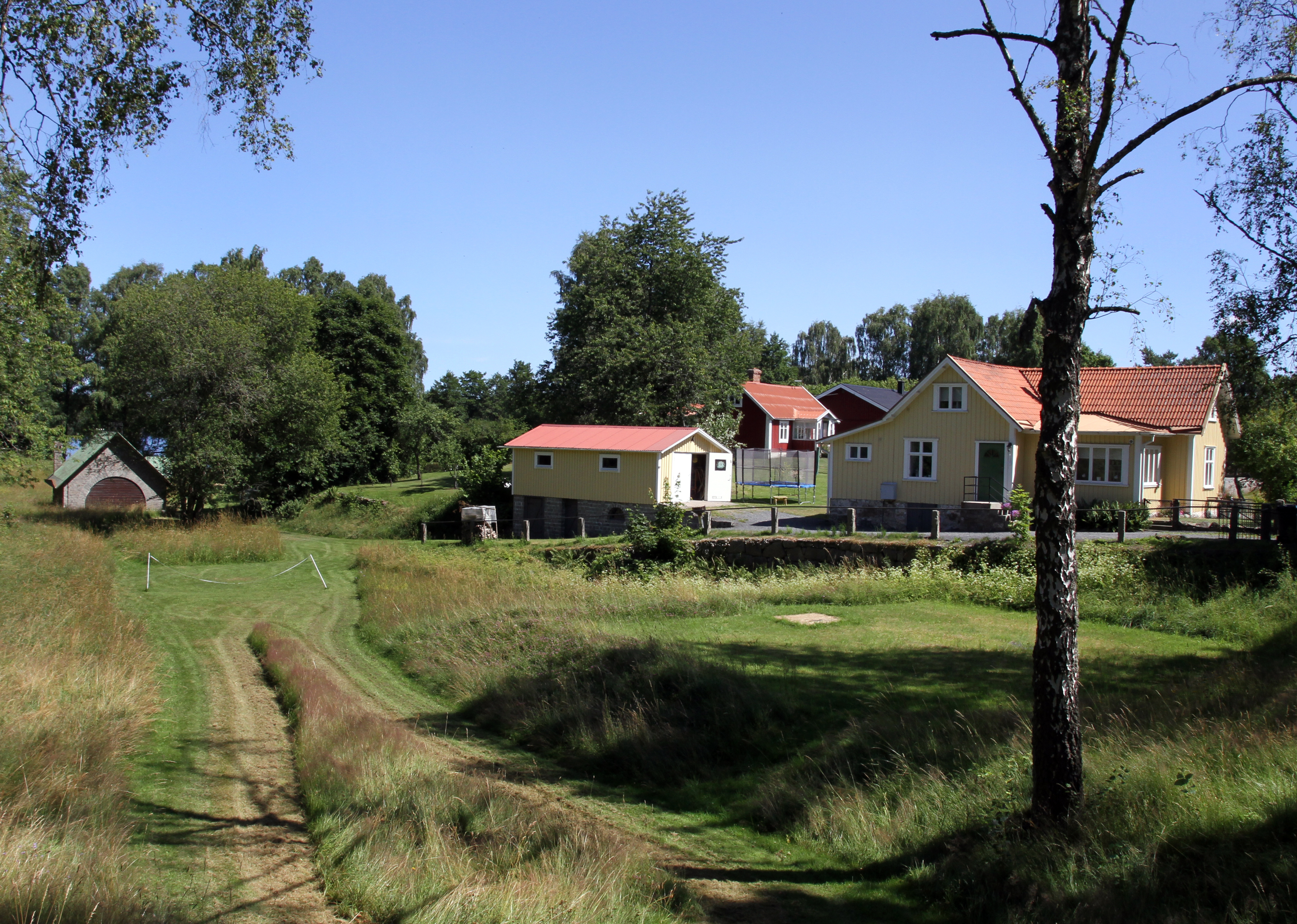 Froarps Vattenverk, Asarum, Karlshamn 17 juli 2015